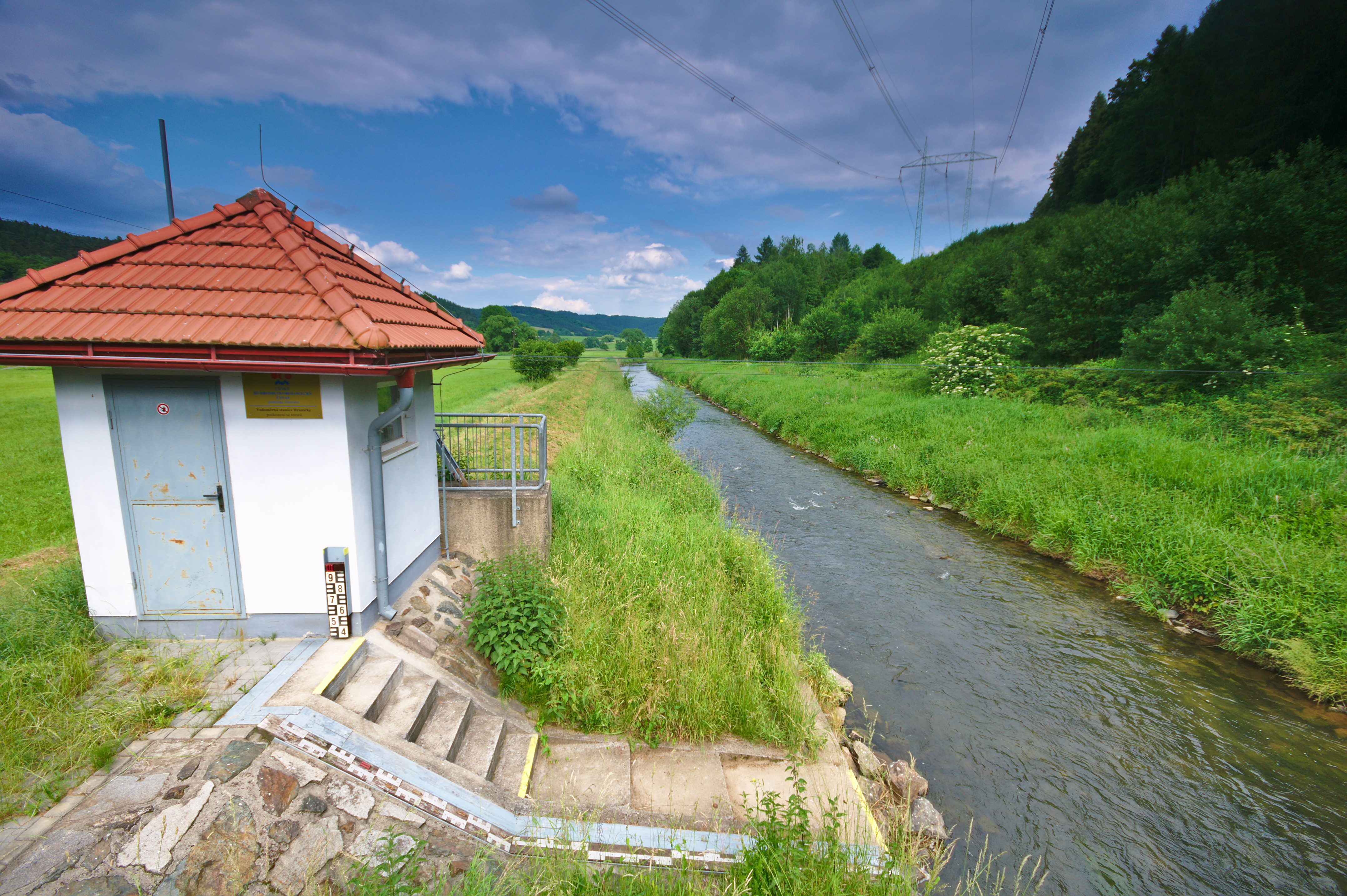 Měření výšky hladiny toku na řece Třebůvka, Jarovice, Vranová, Vranová Lhota, okres Svitavy